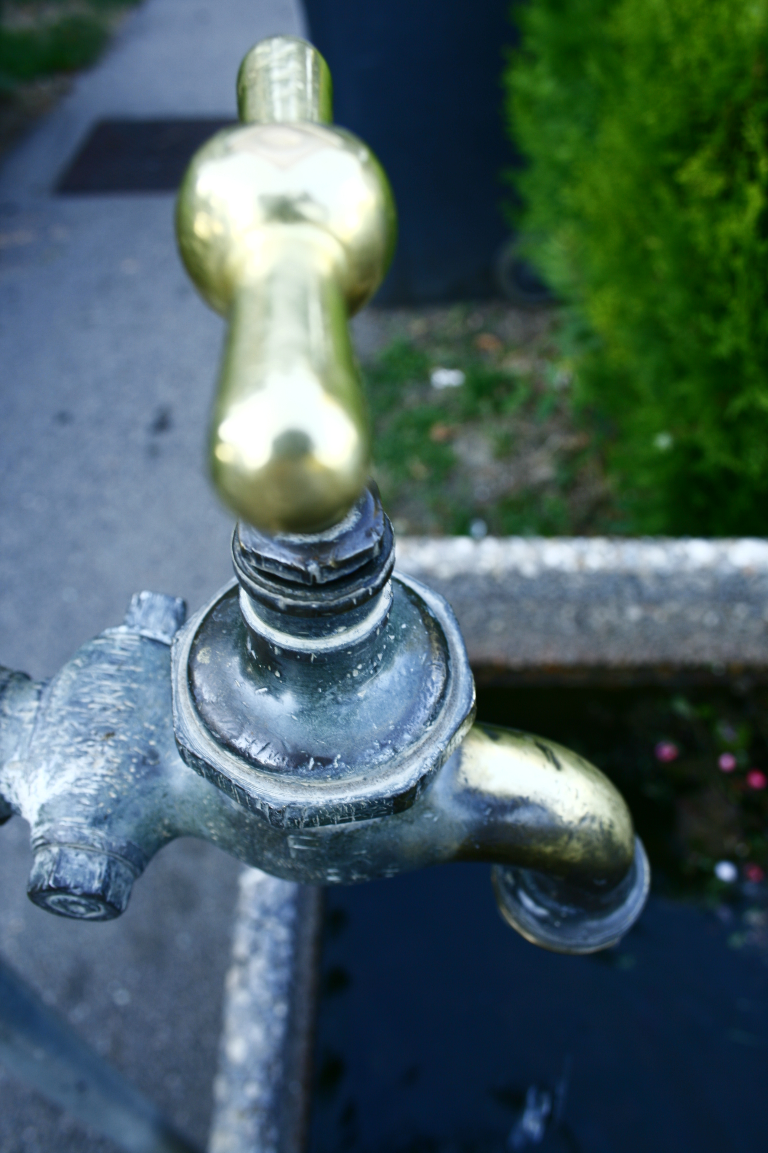 Wasserhahn (Technik), Çeşme